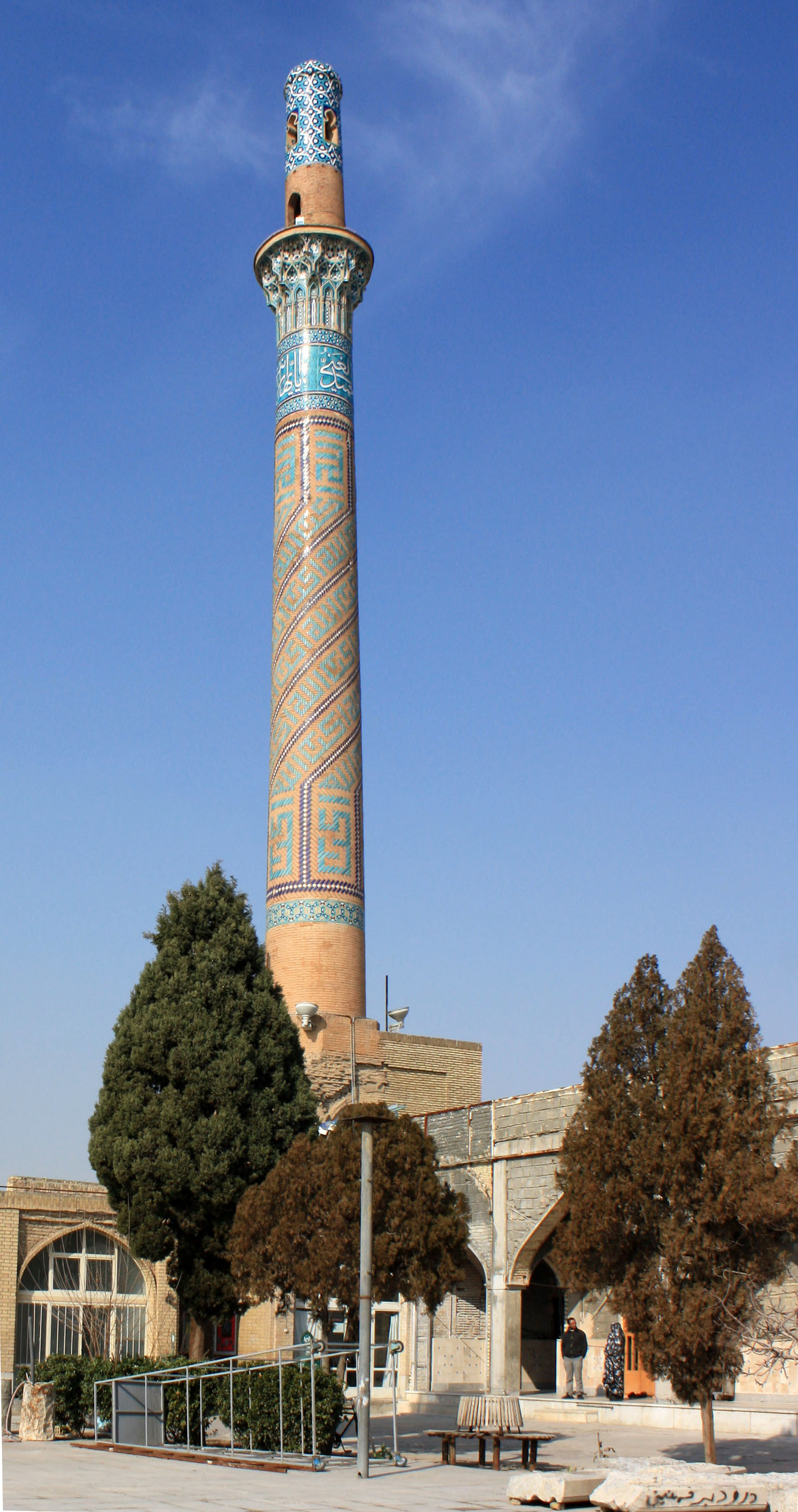 Bagh-e-Ghoushkhane minaret